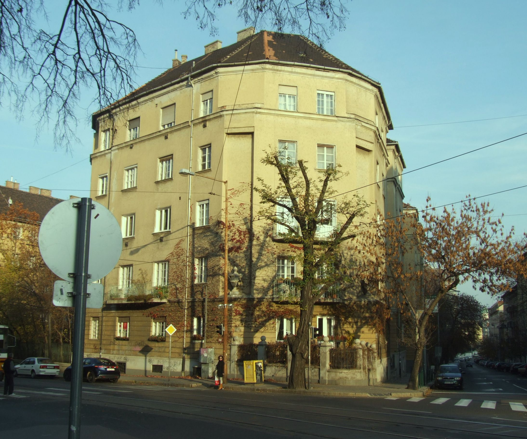 Nemes Nagy Ágnes lakóháza a Királyhágó utca és Böszörményi út sarkán, Budapesten